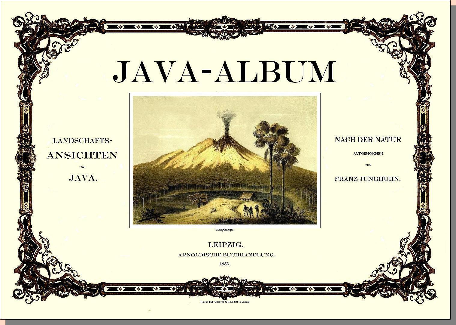 Java-Album